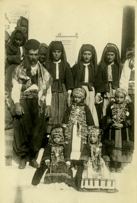 Φωτογραφία με γυναίκες, άνδρες και «κανακαρές» (πρωτότοκες κόρες) από την Κάρπαθο, Δωδεκάνησα, με τοπικές ενδυμασίες. Αρχές 20ού αιώνα. Φωτογραφικό Αρχείο Πελοποννησιακού Λαογραφικού Ιδρύματος, Ναύπλιο